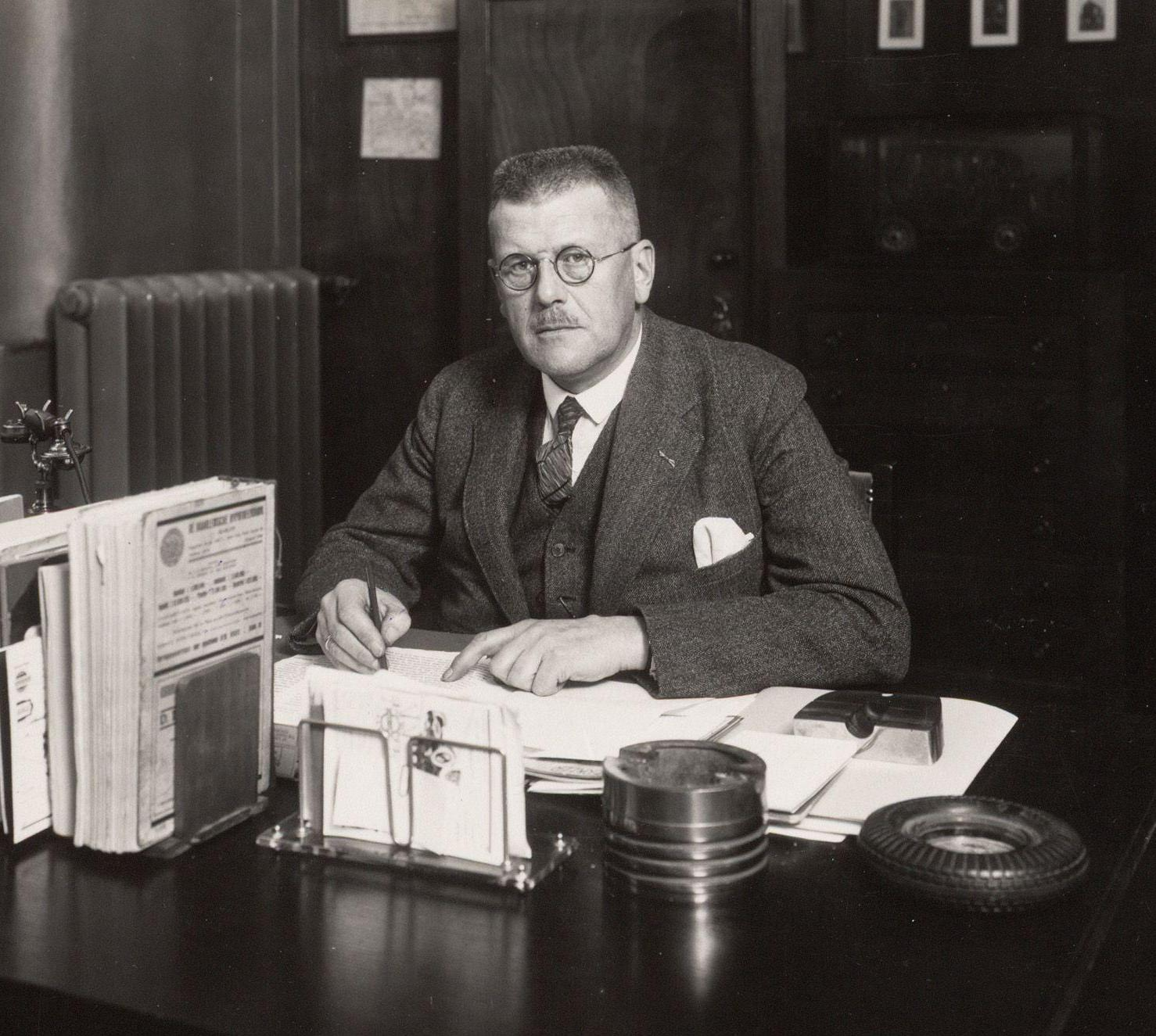 Claas Bakker (1877-1949); Waarnemend hoofdcommissaris van politie te Amsterdam 1942-1943